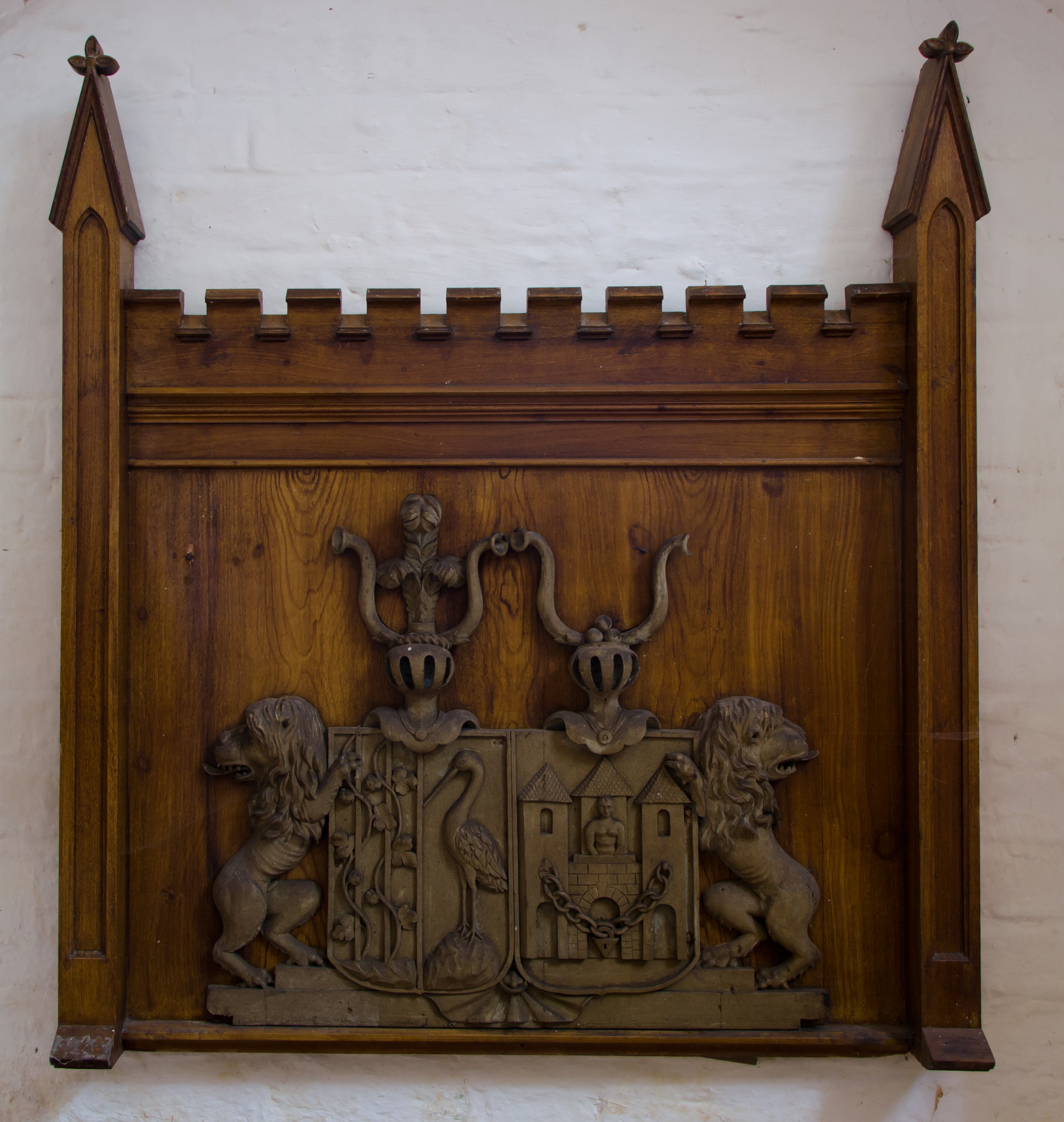 Westenbrügge Kirche Wappentafel